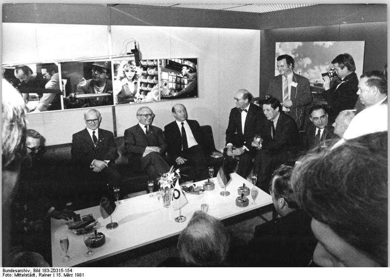 ADN-ZB Mittelstädt-15.3.81-eng Leipzig: Frühjahrsmesse 81-Gesprächspartner Erich Honeckers und weiterer DDR-Repräsentanten waren am Messestand des BRD-Unternehmens Salzgitter AG der Vorstandsvorsitzende der Aktiengesellschaft, Ernst Pieper (3.v.l.), der Leiter der Ständigen Vertretung der BRD in der DDR, Klaus Bölling (5.v.l.), und weitere Vertreter des BRD-Unternehmens.